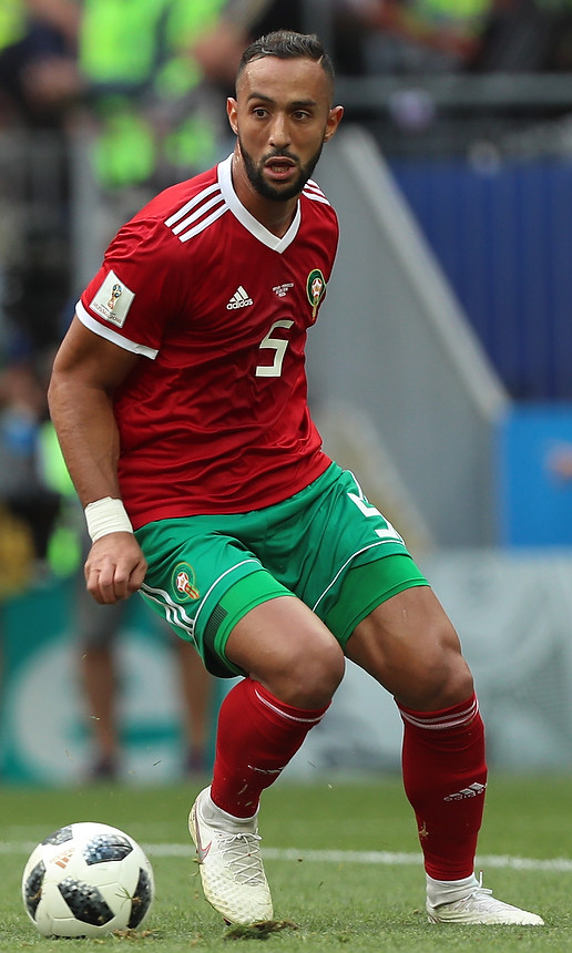 День, когда Роналду вошел в историю. Португалия в Москве обыграла Марокко